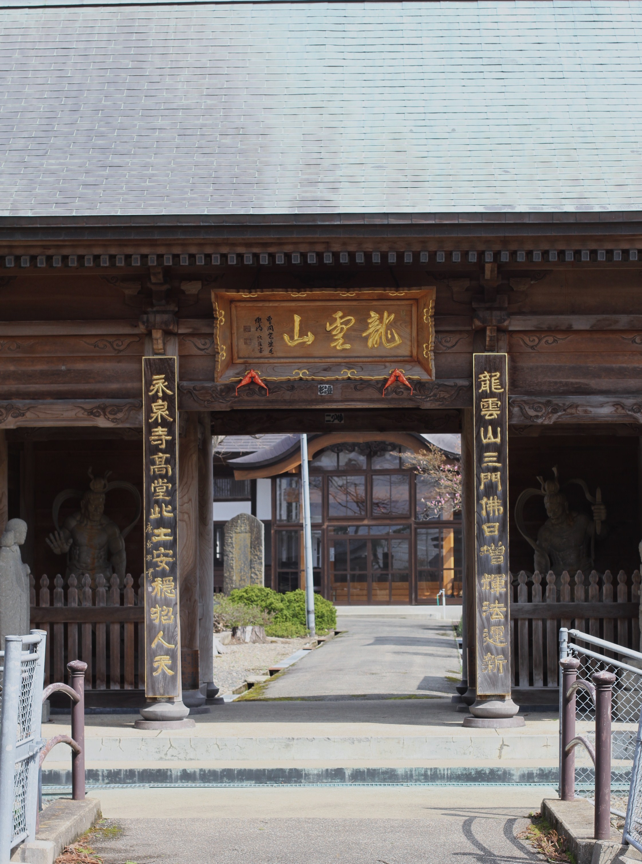 曹洞宗龍雲山永泉寺（秋田県仙北郡美郷町六郷）